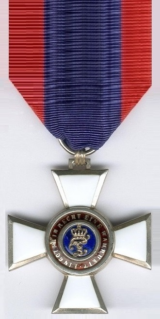 Ritterkreuz 2. Klasse (ohne Krone) des Oldenburgischen Haus- und Verdienstordens